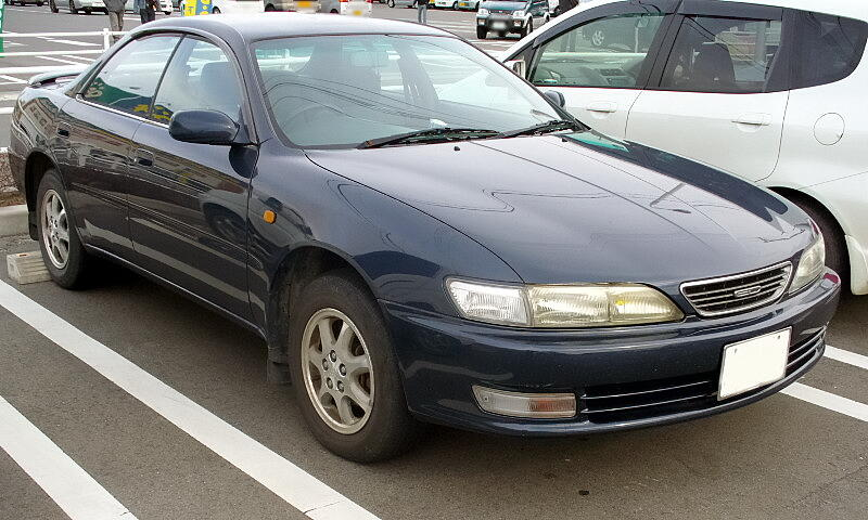 トヨタ・カリーナED（3代目・後期型）